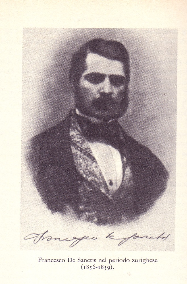 Francesco De Sanctis. La fotografia è stata scattata intorno al 1856 e si trova su diverse antologie. Io l'ho ricavata dalla Storia della letteratura italiana della Garzanti. L'ho passata allo scanner e modificata.